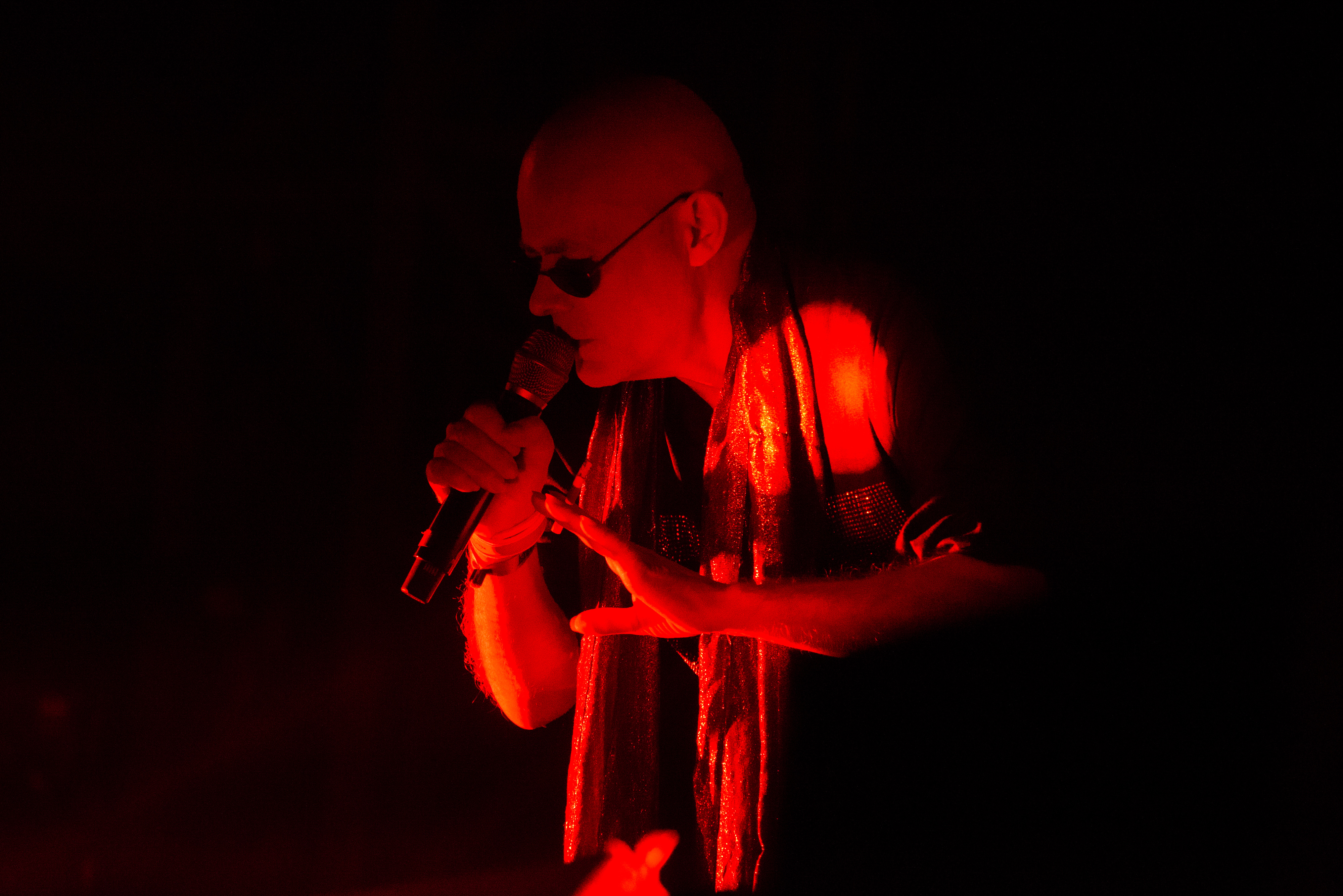 Concert du groupe The Sisters of Mercy au Hellfest 2019.